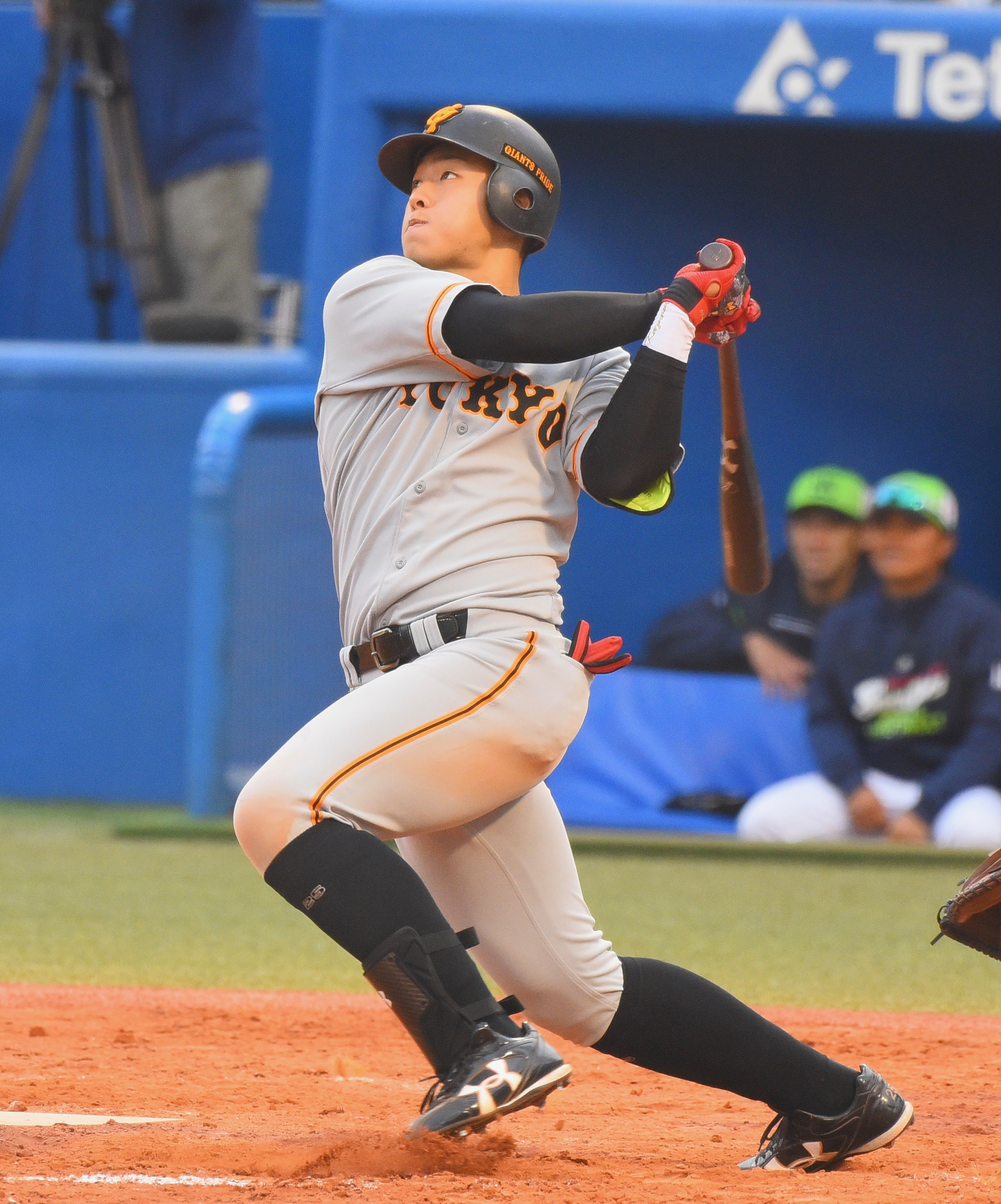 読売巨人軍 岡本和真 2018年4月7日 神宮球場